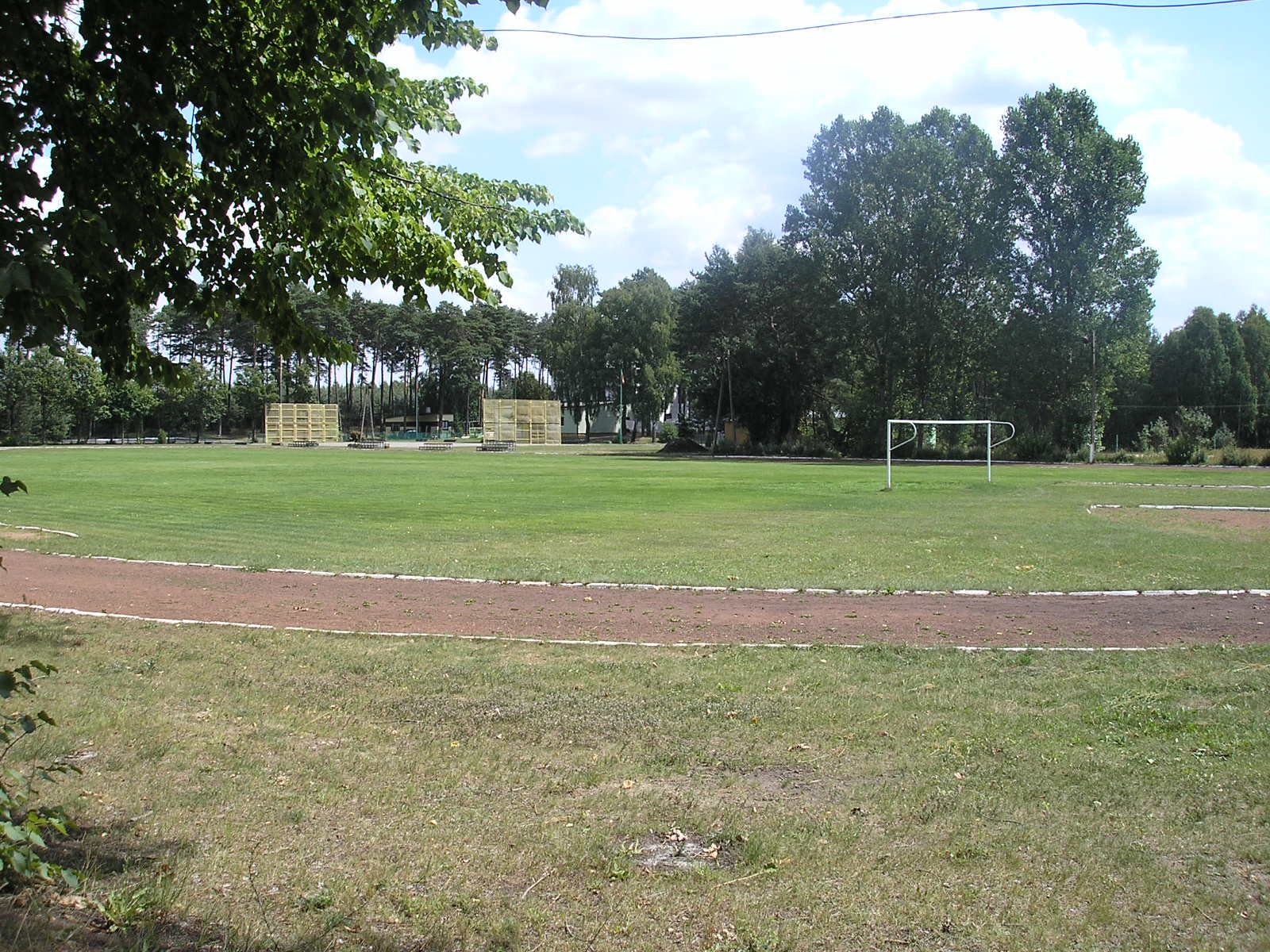 Ośrodek sportowy (stadion) Ręcznie. p.s. pozdro dla wszystkich mieszkańców. A.D. Paskrzyn